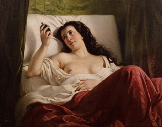 Sogno d'amore, olio su tela, 90 x 118 cm.